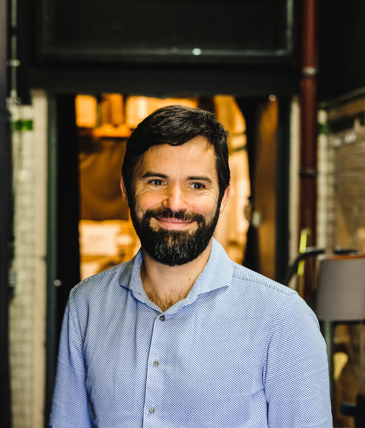 Foto: Andi Weiland